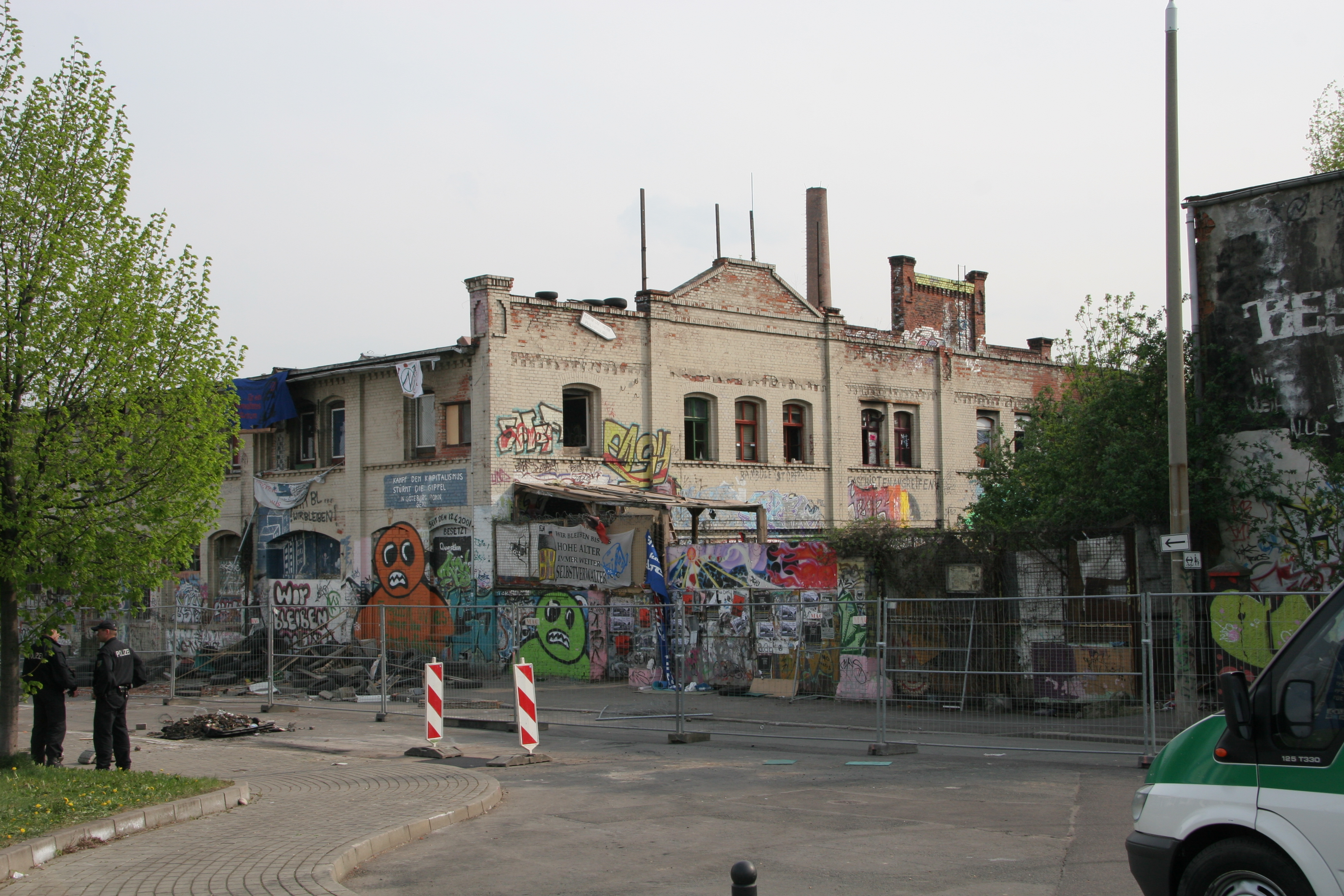 Räumung des Besetzten Hauses in Erfurt am 16. April 2009